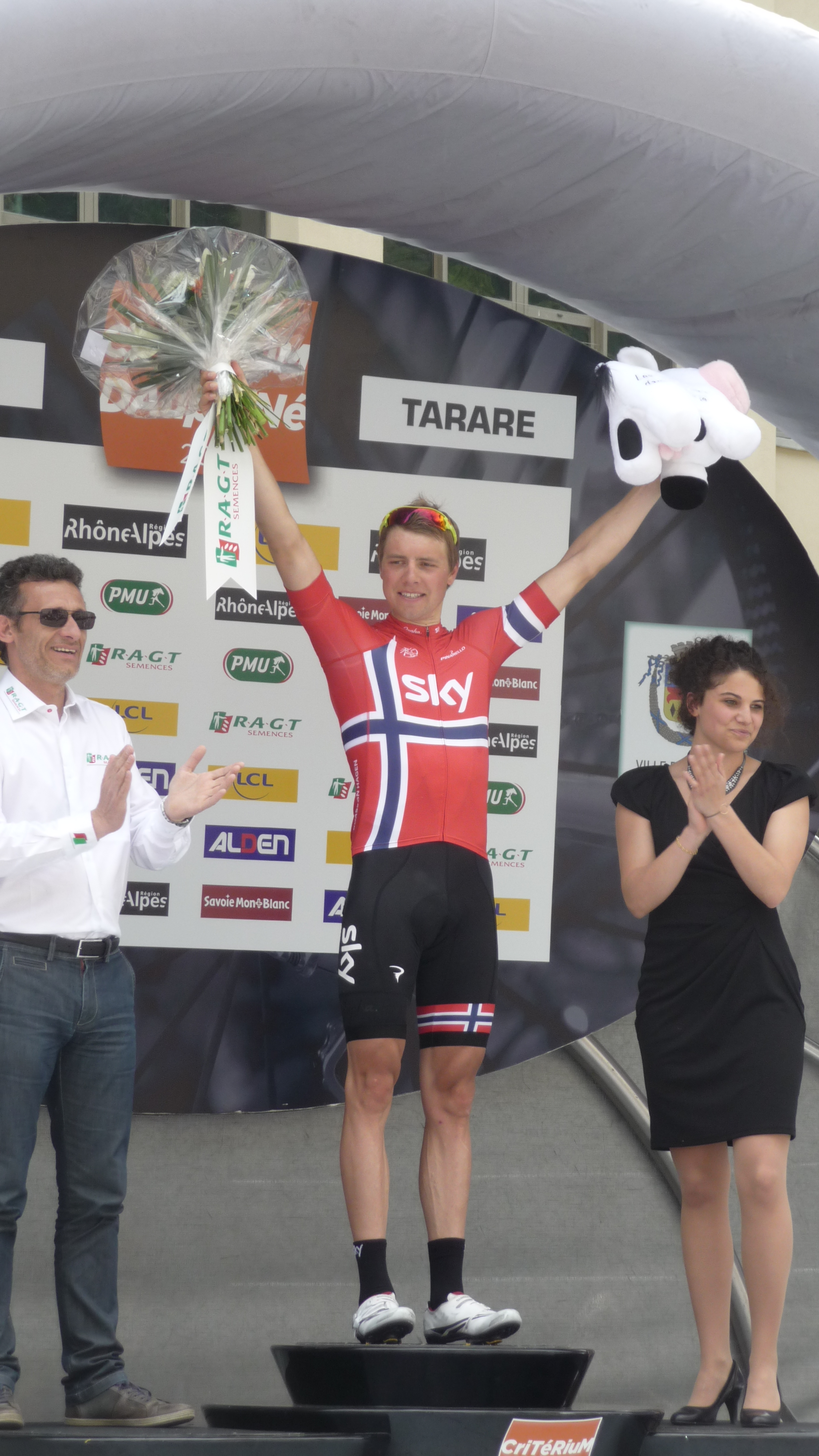 Arrivée de la 3e étape du Critérium du Dauphiné 2013 à Tarare le mardi 4 juin 2013. Podium de la 3e étape à Tarare, Edvald Boasson Hagen vainqueur de l'étape